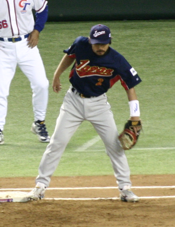 小笠原道大